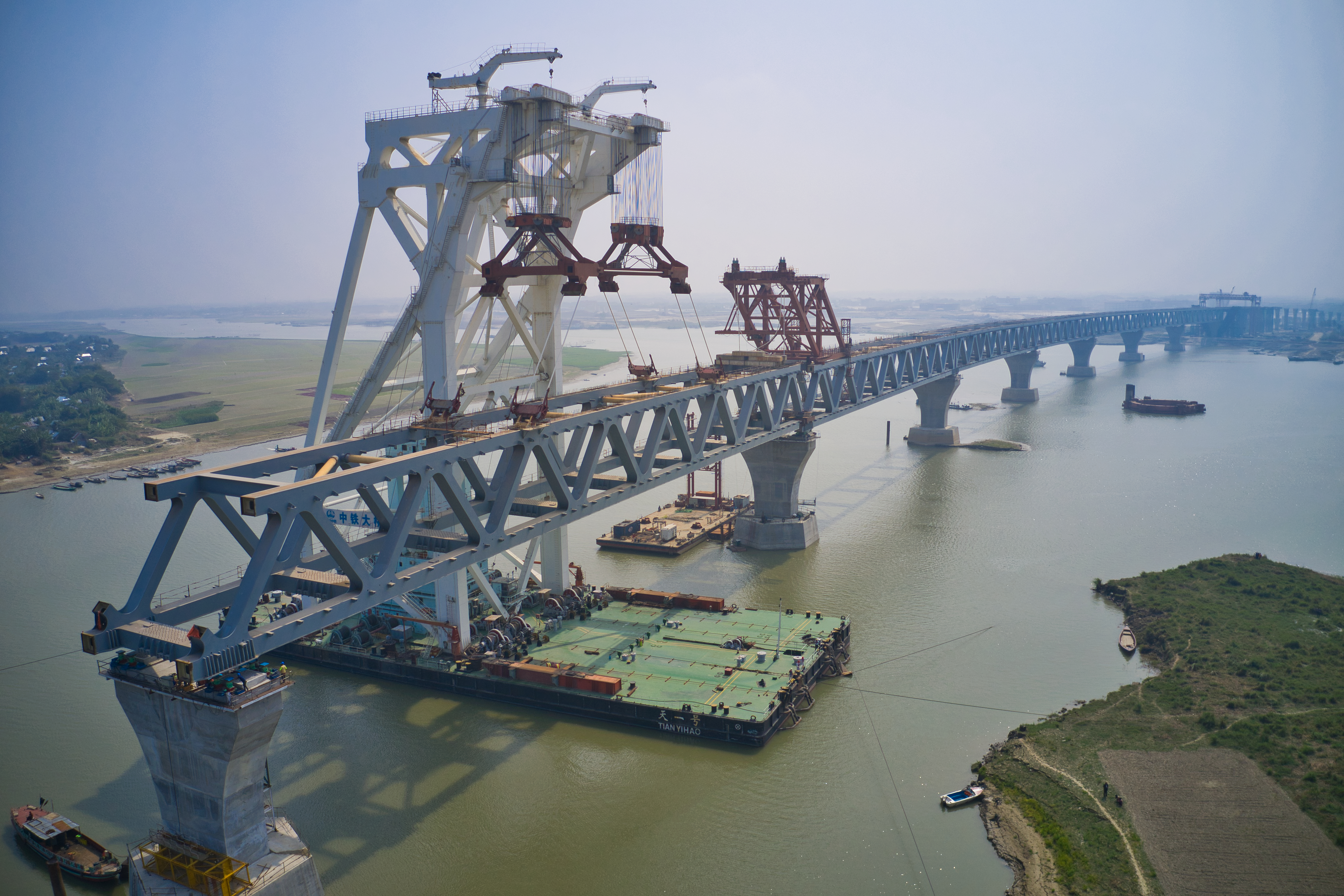 পদ্মা সেতু